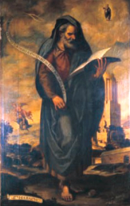 "Haboc", óleo sobre lienzo del artista Nicolás Javier de Goríbar, perteneciente a la Escuela Quiteña del siglo XVII. Se exhibe en la Iglesia de Lla Compañía de Jesús, en la ciudad de Quito. Es parte de la serie llamada "Los Profetas", que el artista pintó por encargo de la orden jesuita especialmente para el templo.